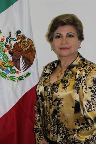 Andrea Saldaña al ocupar el cargo de directora del IMES 2015